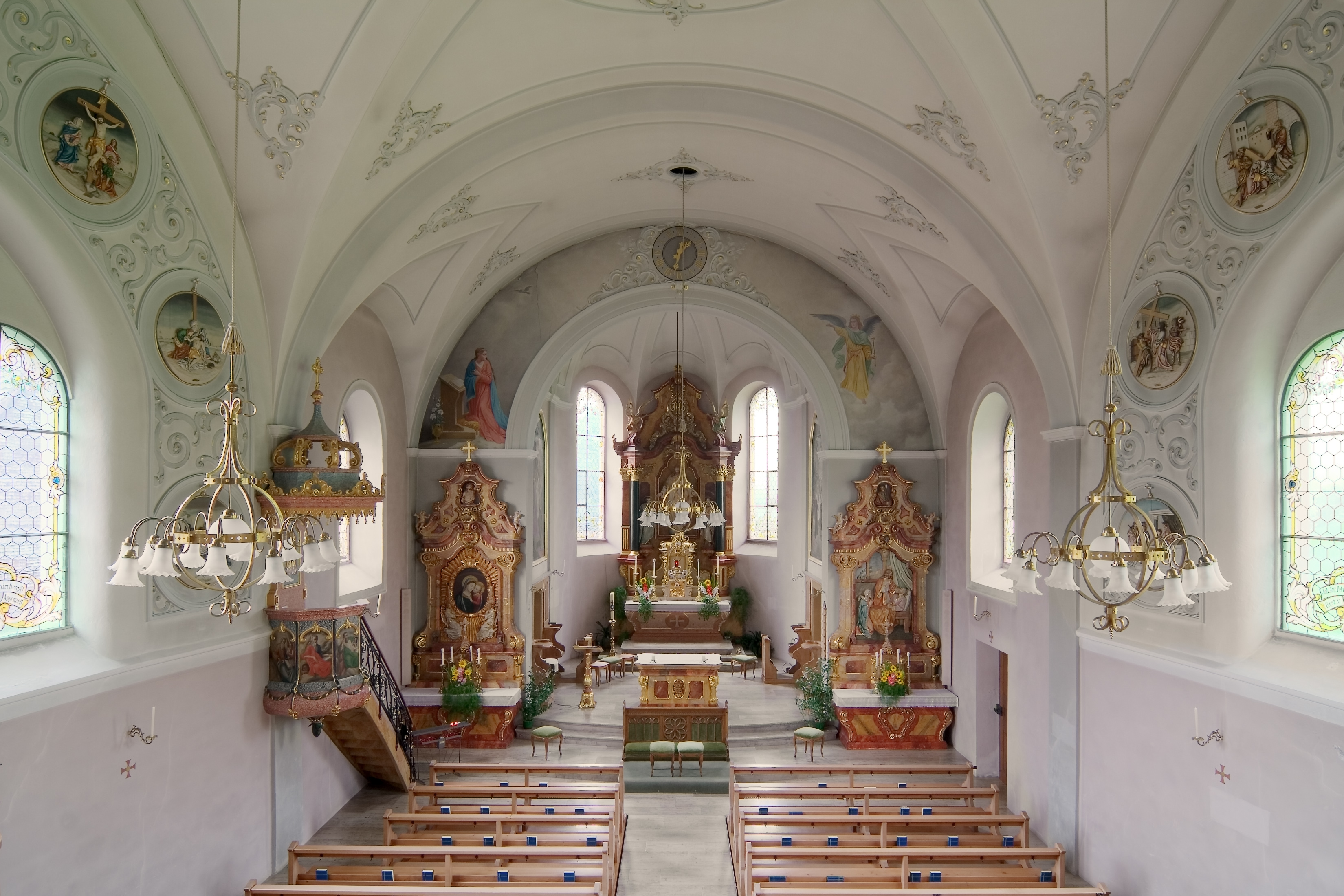 Die Wallfahrtskirche in Schlatt, 1911 erbaut, Architekt: August Hardegger